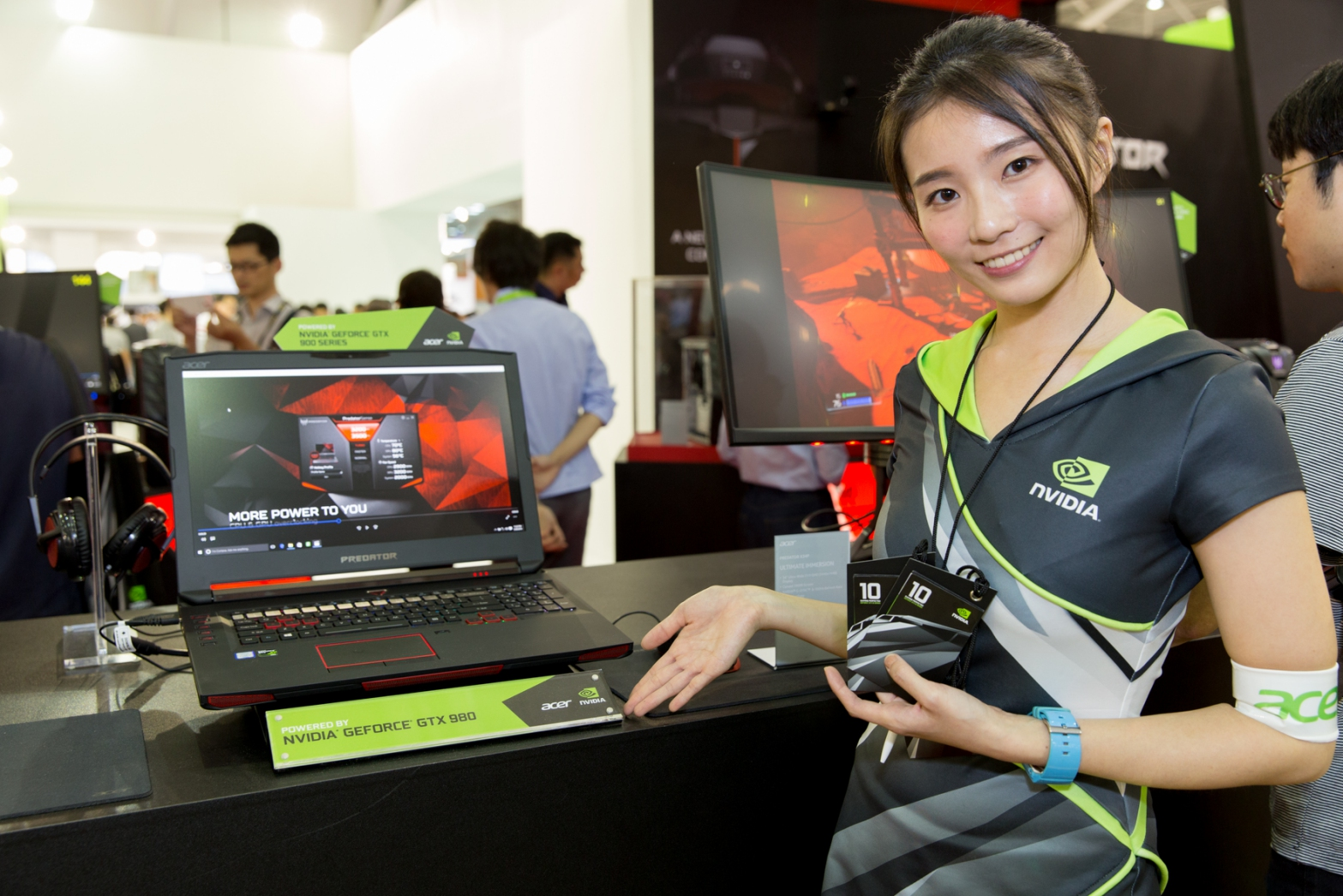 2016台北國際電腦展，宏碁Predator筆記型電腦與宣傳模特兒。